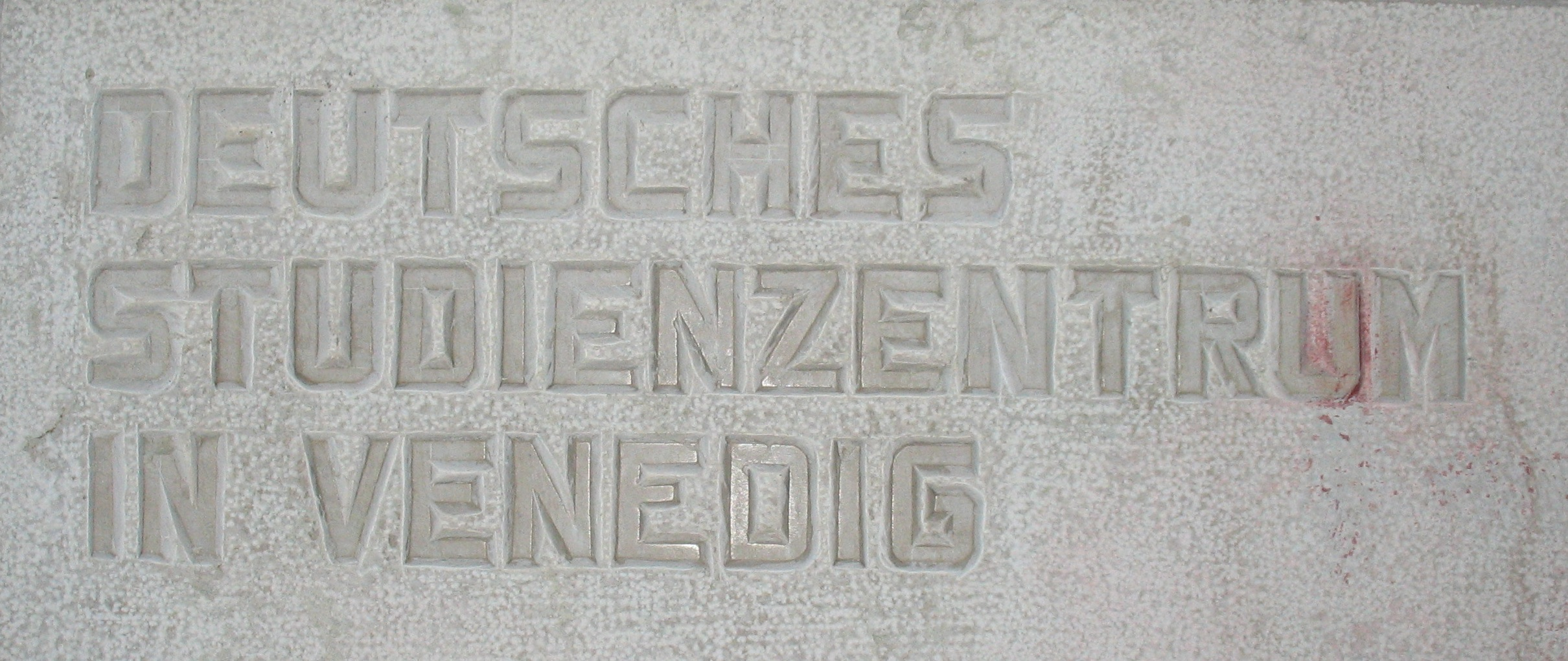 Namensschild neben dem Eingang zum Deutschen Studienzentrum in Venedig